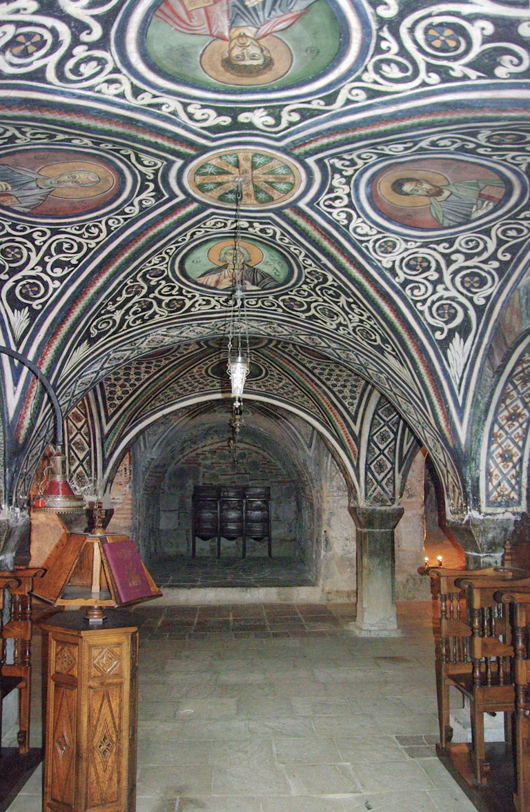 Barbara-Kapelle Kloster Osios Loukas